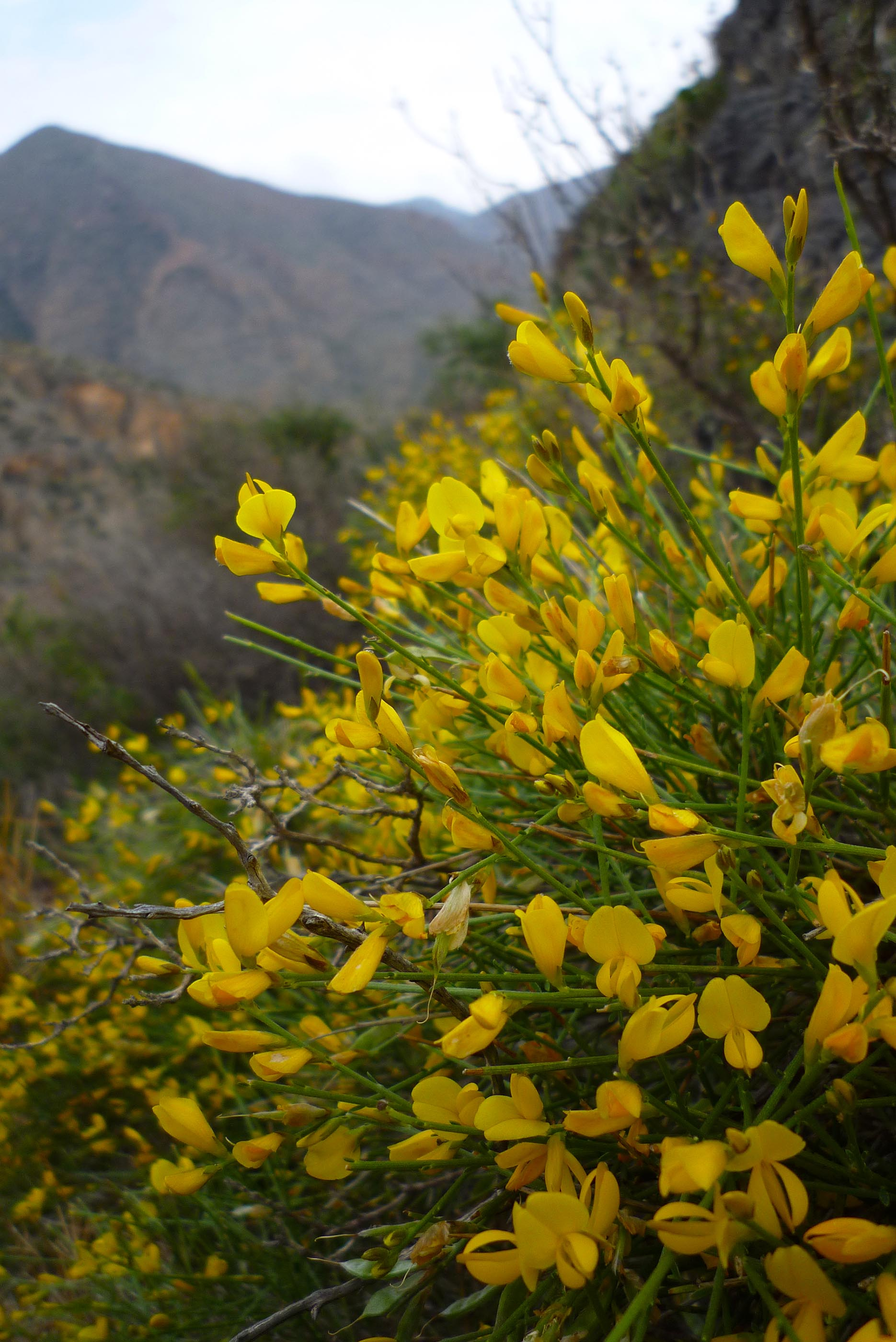 Genista jimenezii en Cabo Tiñoso, Cartagena, España.